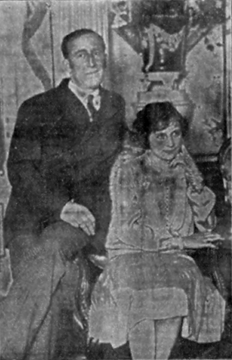 Boda de Ignacio Baleztena y Carmen Abarrategui